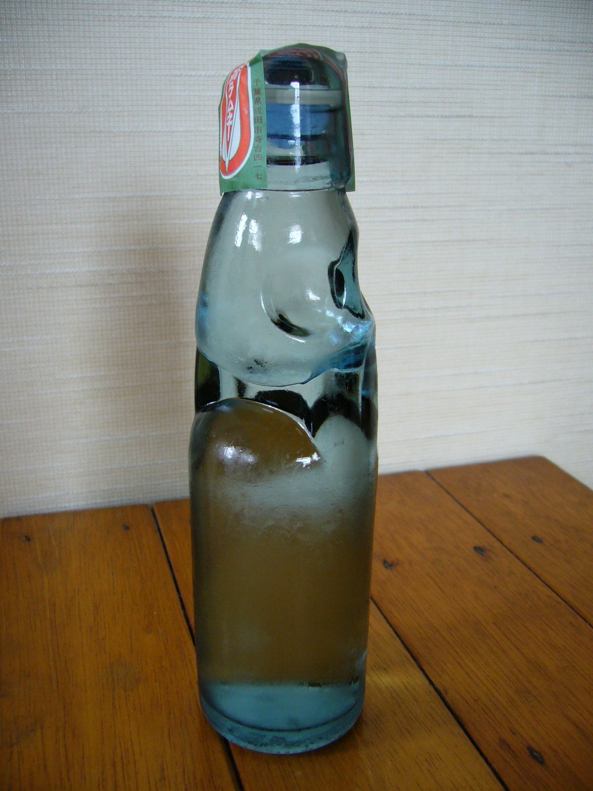 ramune-sprite/club soda,narita-city,japan